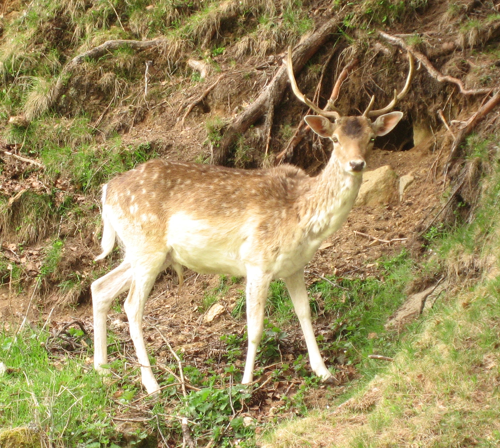 Dama dama in Parc de Merlet (Daim) Map: 45° 54' 26" N 6° 49' 2" E